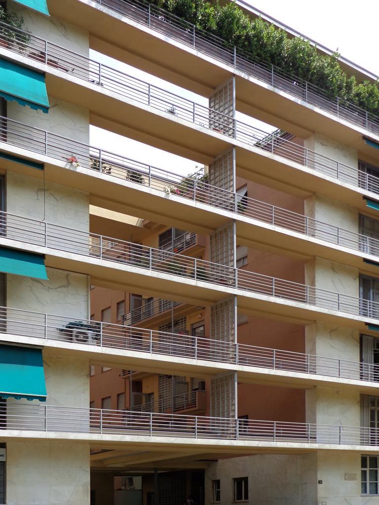 Milano, casa Rustici. Particolare dei balconi sospesi.